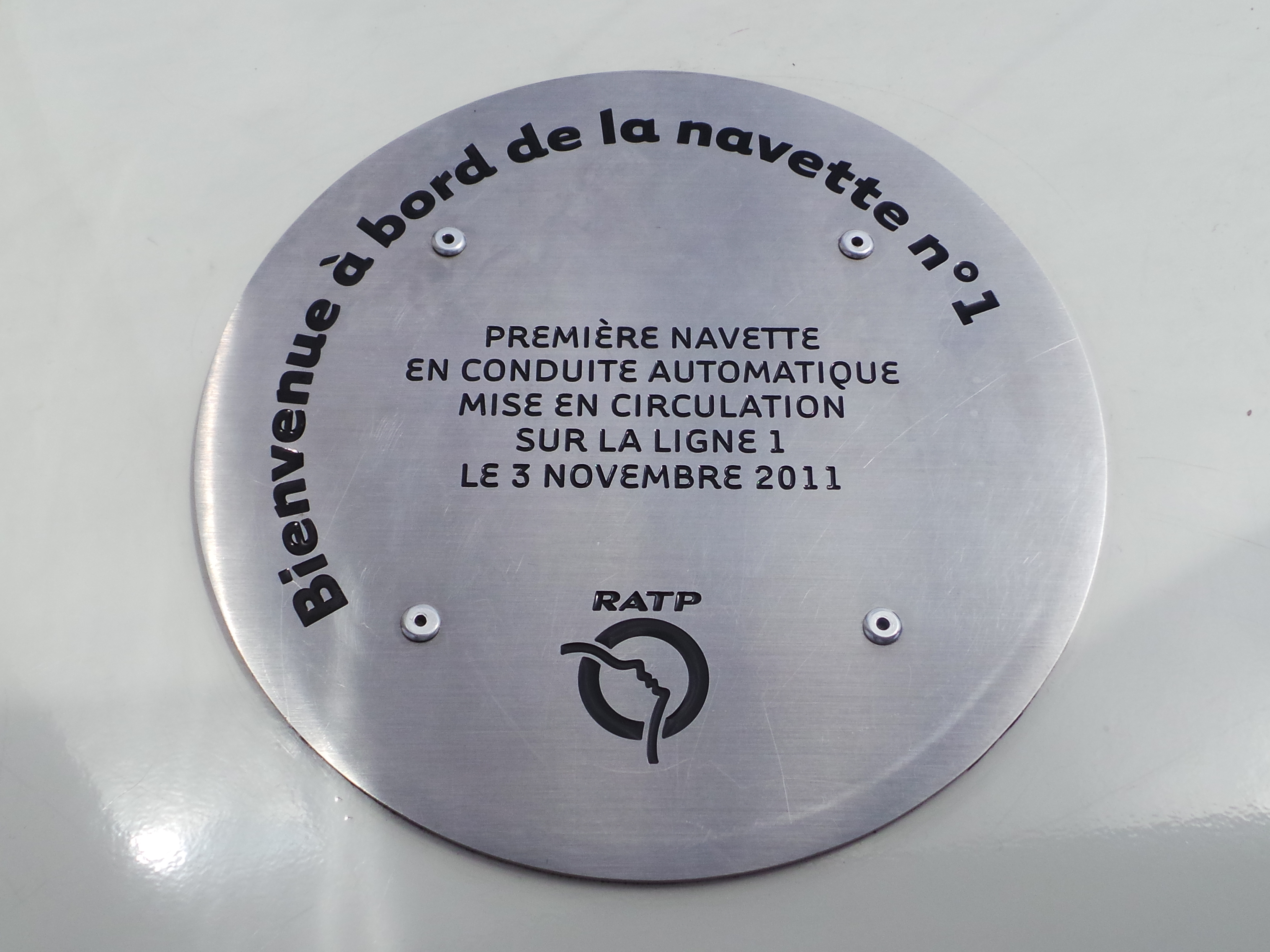 Rame MP05 n° 501 - Plaque commémorative de la mise en service sur la ligne 1 du métro de Paris de la première rame MP05 le 3 novembre 2011 - métro de Paris, Paris, France